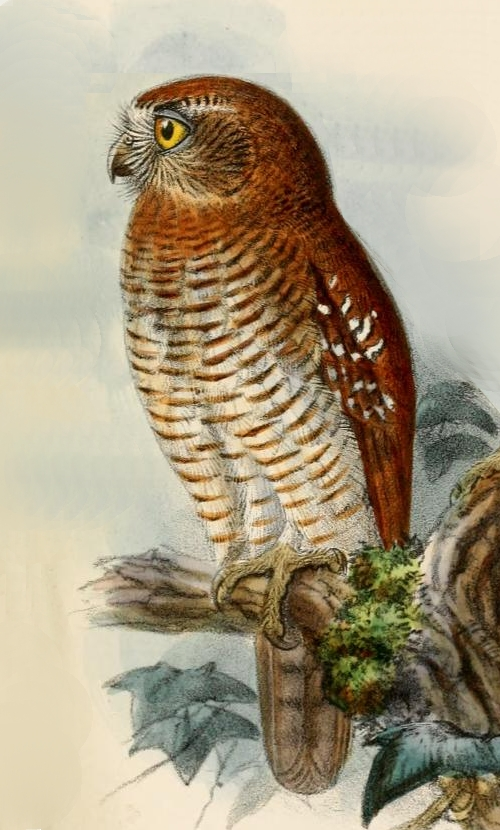 Ninox squamipila, Moluccan Hawk-owl